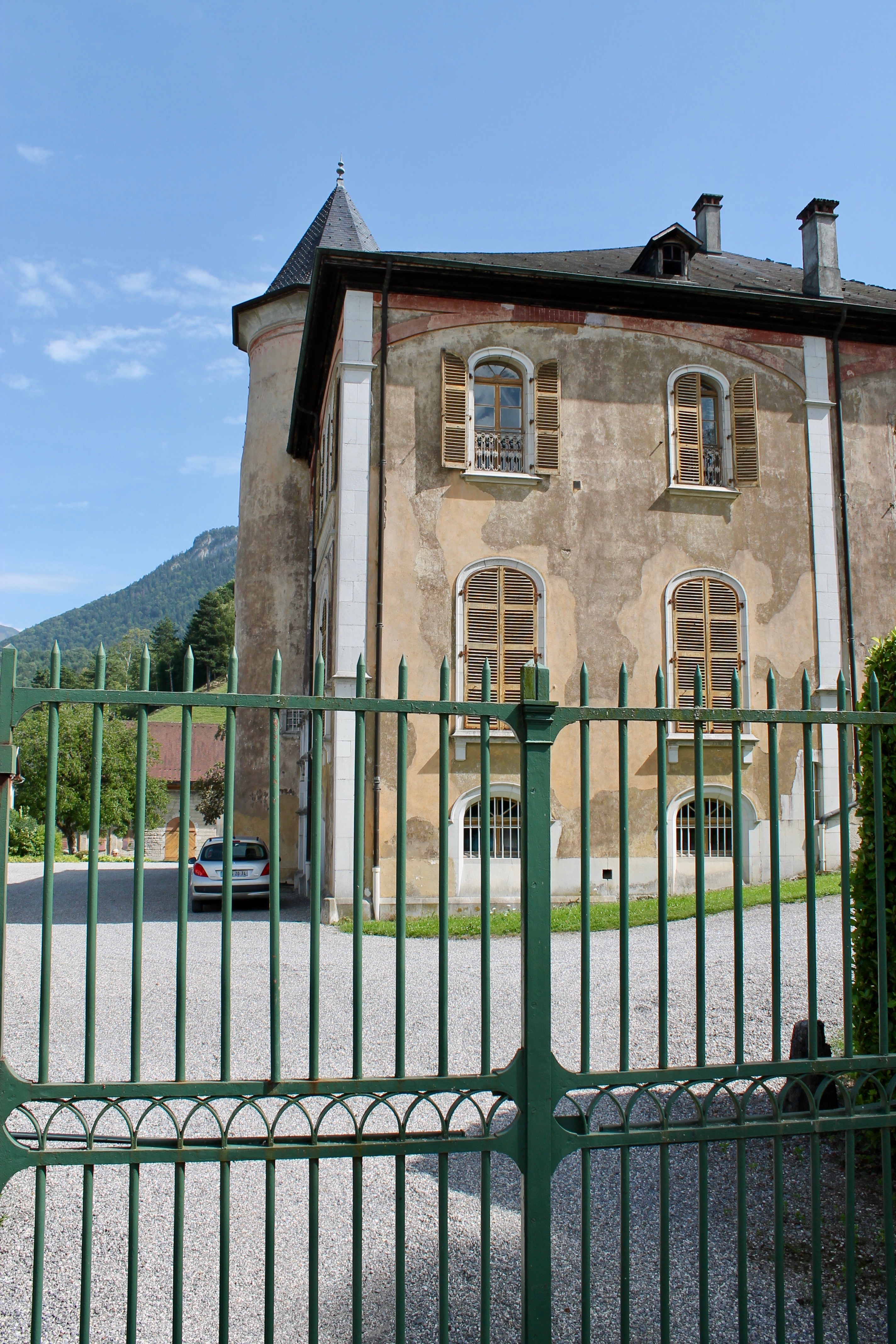 Château de Gye, situé sur la commune française de Giez (Haute-Savoie).